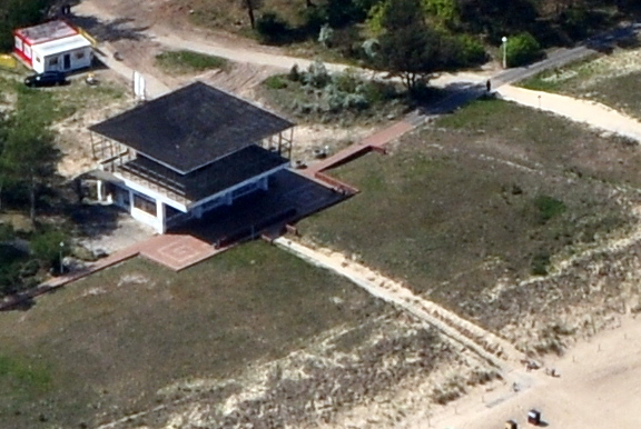 Die Bilder wurden von mir während eines einstündigen Rundflugs ab Flugplatz Güttin am 21. Mai 2011 aufgenommen. Die Bildbeschreibung steht im Dateinamen. Aufgenommen mit einer Nikon D5000 durch das Seitenfenster des Flugzeugs. This is a photograph of an architectural monument. It is on the list of cultural monuments of Baabe